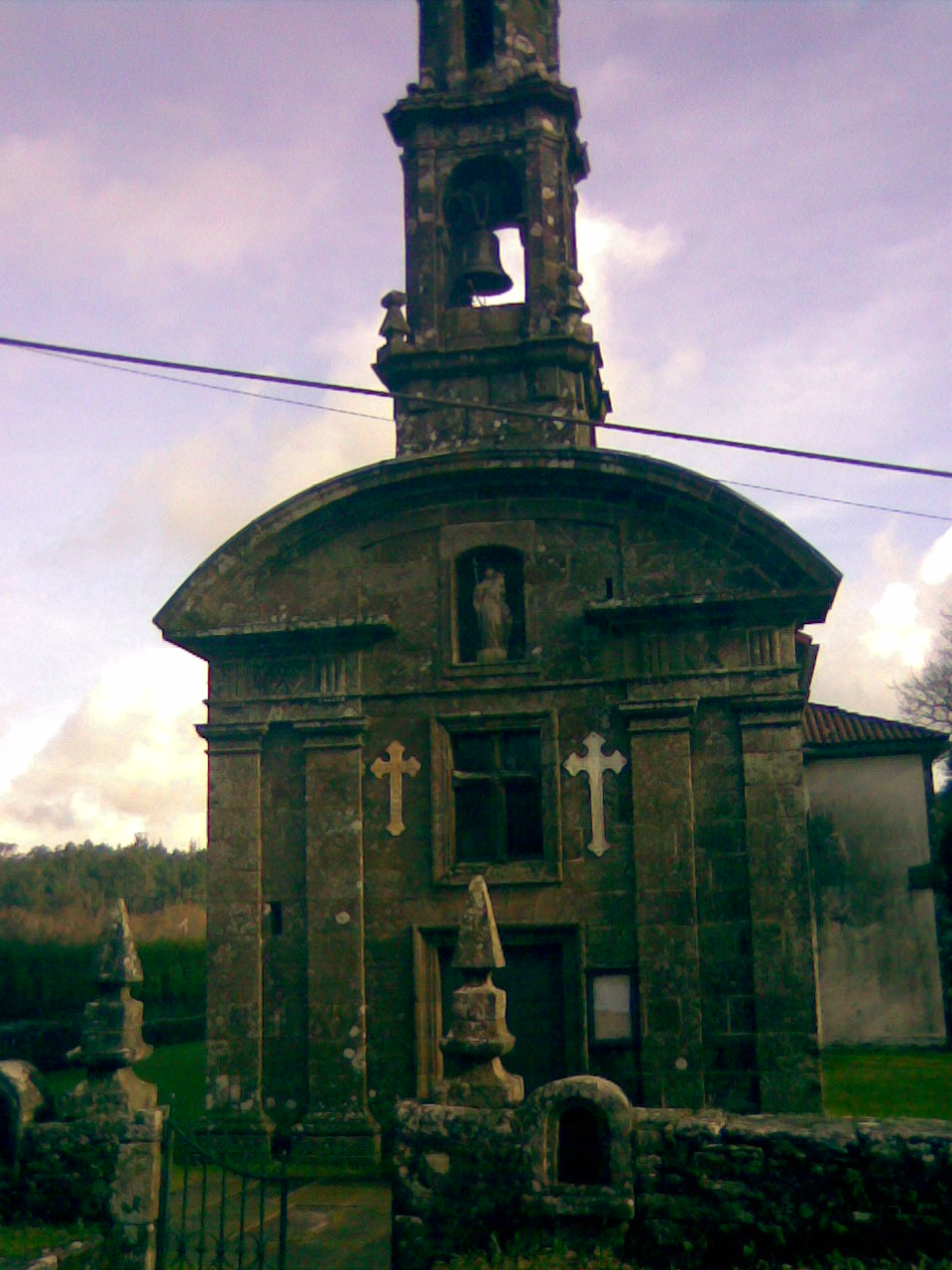 Iglesia de Santa María A Peregrina.